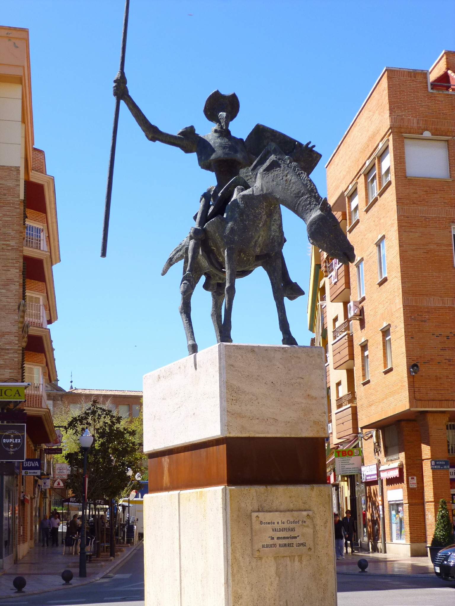 Valdepeñas (Ciudad Real)